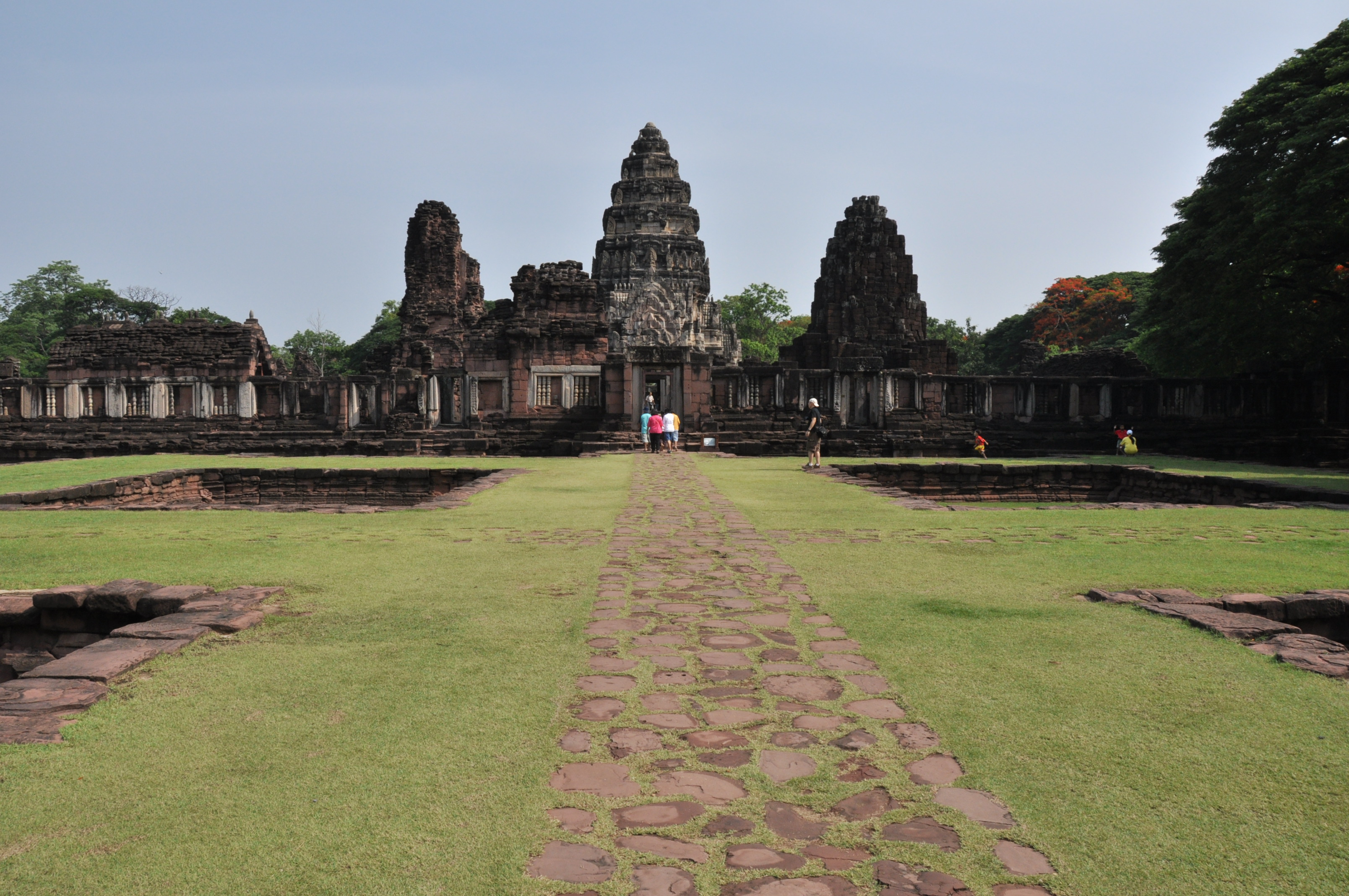 ชาลาทางเดิน